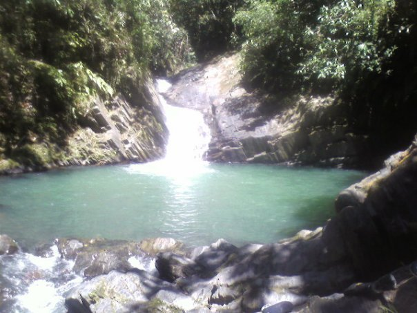 Tomado de un miembro aportante de Topaipí